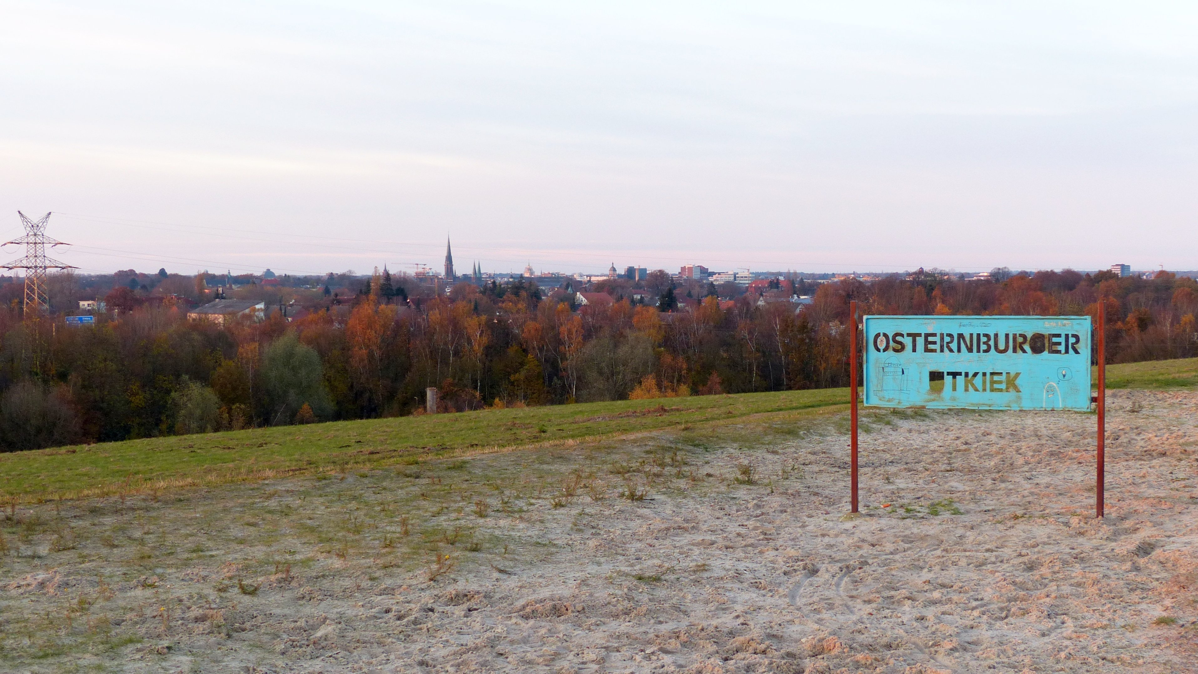 Blick vom Nordhügel des Osternburger Utkiek in Richtung Oldenburg Innenstadt. Man sieht unter anderem (v. l.) das Staatstheater, die Lambertikirche und den Hauptbahnhof.